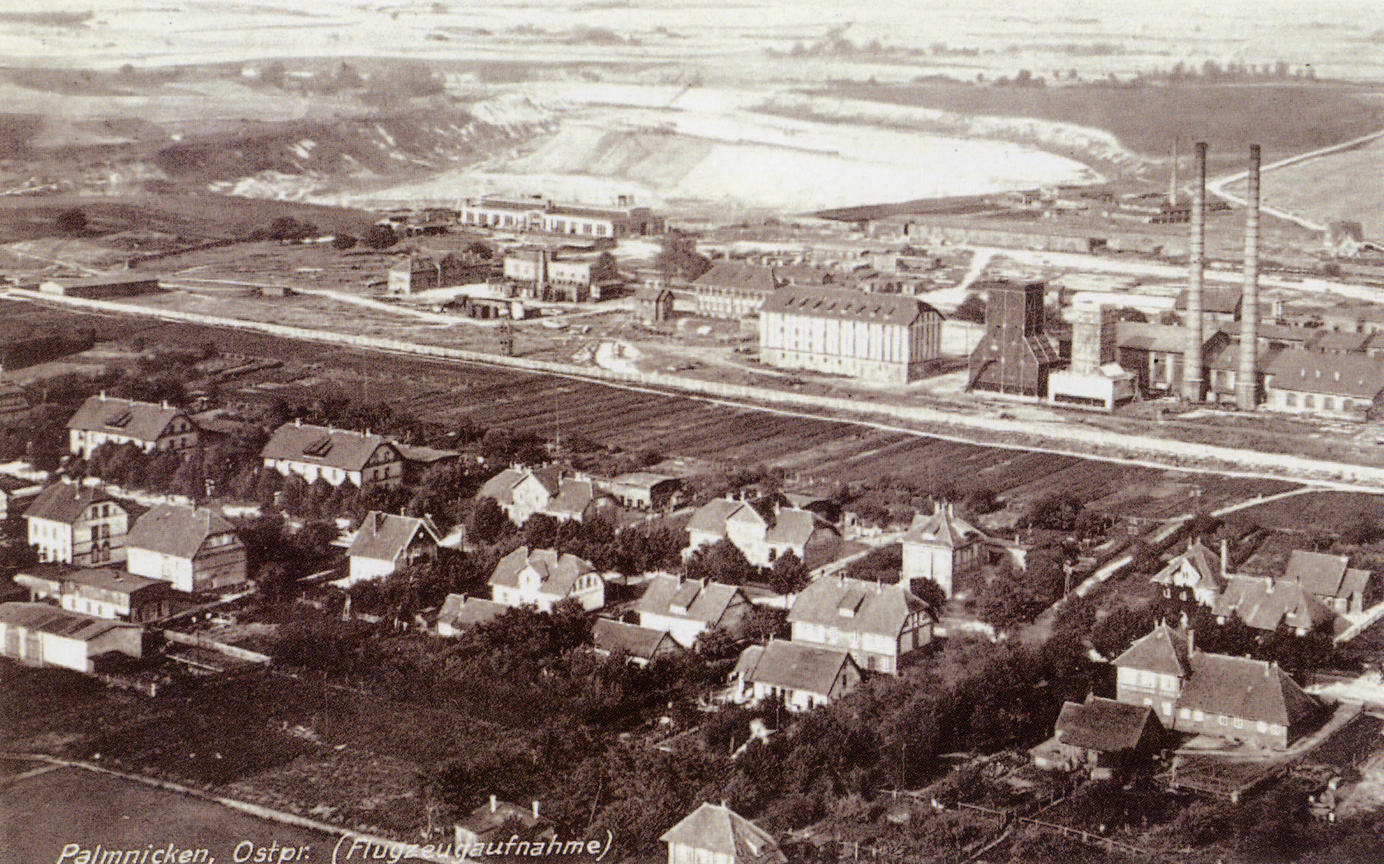 Пальмникен (ныне пос. Янтарный) и карьер Вальтер. Фото 1930 года.